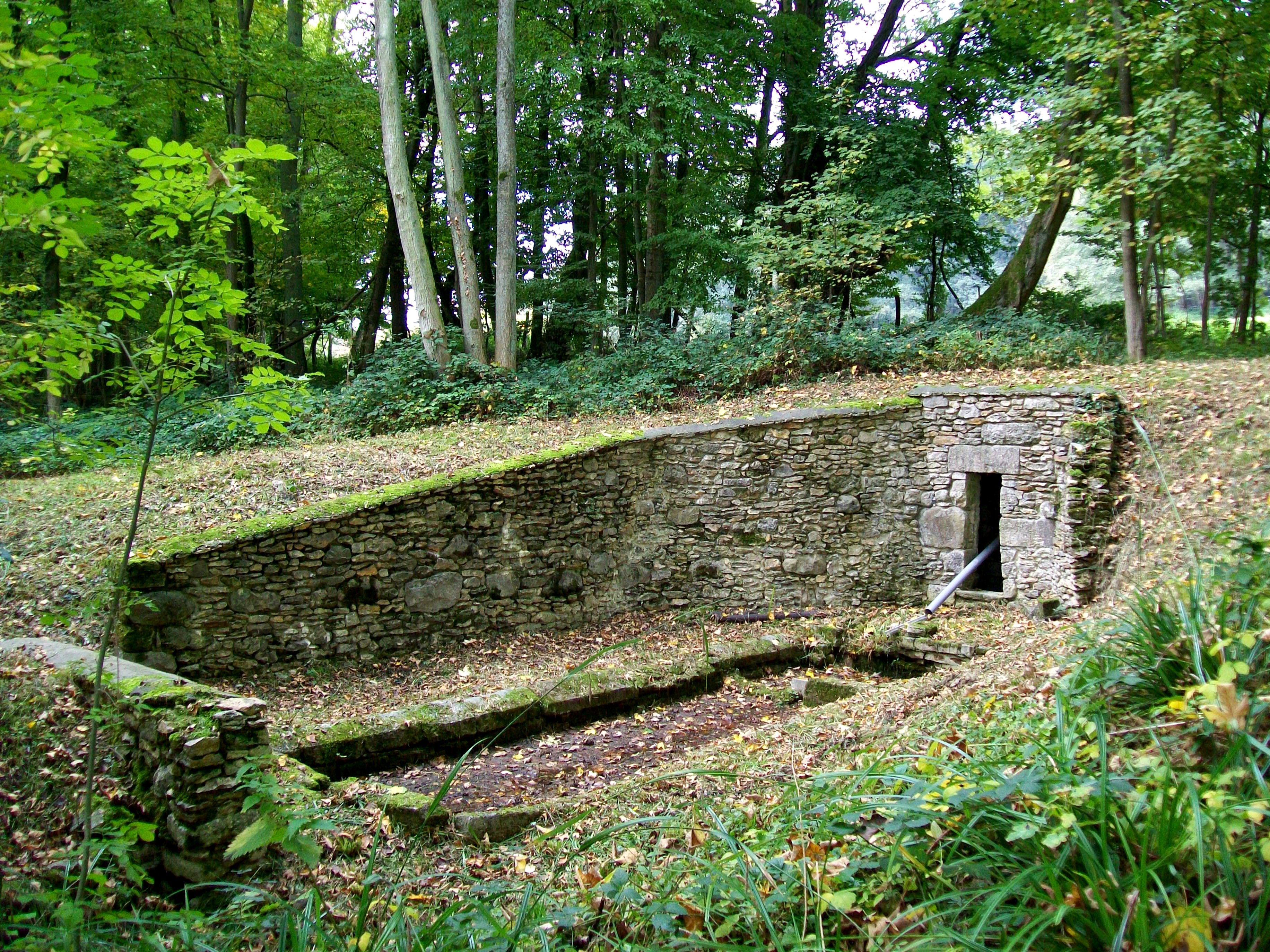 La fontaine Aubert à proximité immédiate du massif forestier d'Halatte, au nord de la commune de Villers-St-Frambourg (60) et à 1.700 m du centre du village. Cette fontaine a la particularité d'être aménagée comme lavoir. Elle est généralement comptée parmi les fontaines de la Forêt d'Halatte.